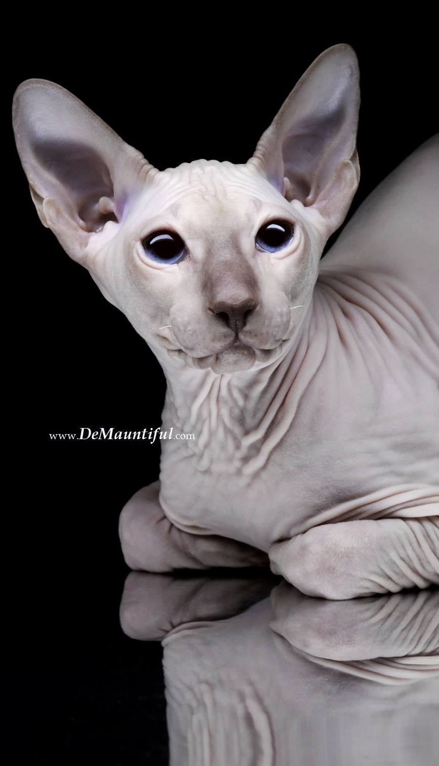 Кот Петерболд Yarick Del Iris, крем-поинт , питомник Demauntiful